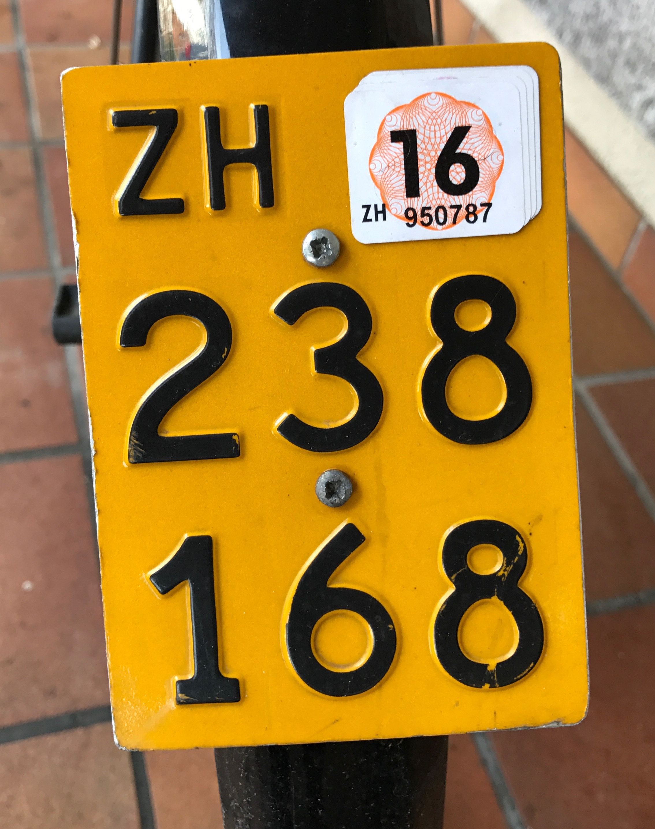 Kontrollschild für Moped